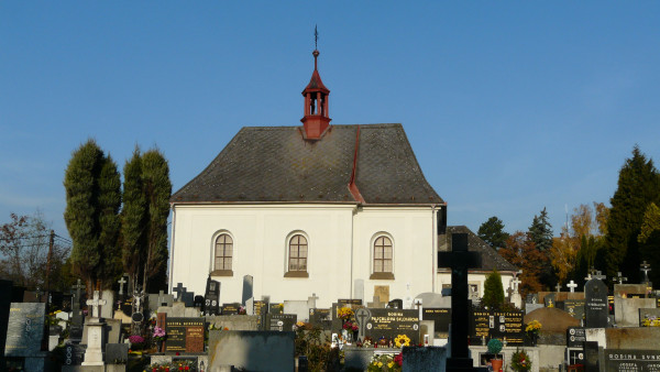 Hřbitovní kostel sv. Jana Křtitele v Konici